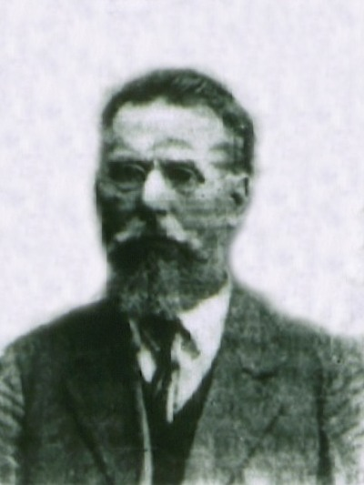 Тимошенко Даниил Мартынович, пресвитер церкви евангельских христиан баптистов г. Киева во времена победоносцевских гонений (1890-е годы)